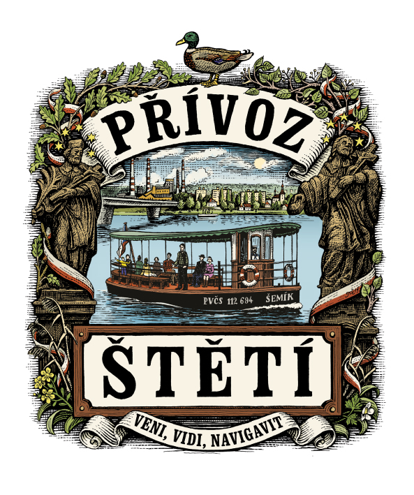 Přívoz Štětí, logo cedule.